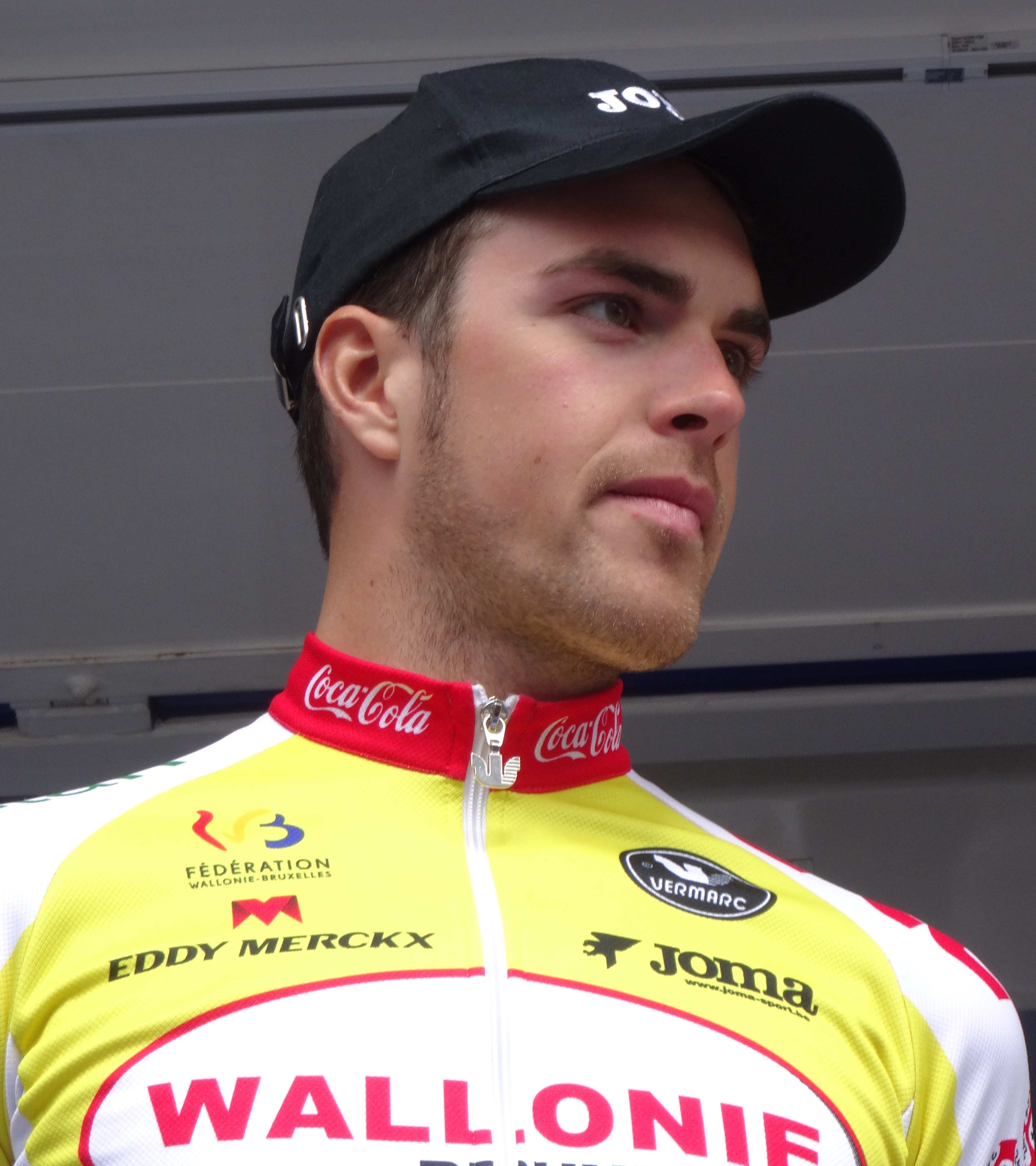 Reportage photographique réalisé le mercredi 7 mai 2014 au départ de la première étape de l'édition 2014 des Quatre jours de Dunkerque à Dunkerque, Nord, Nord-Pas-de-Calais, France. Depicted person: Boris Dron Depicted team: Wallonie-Bruxelles